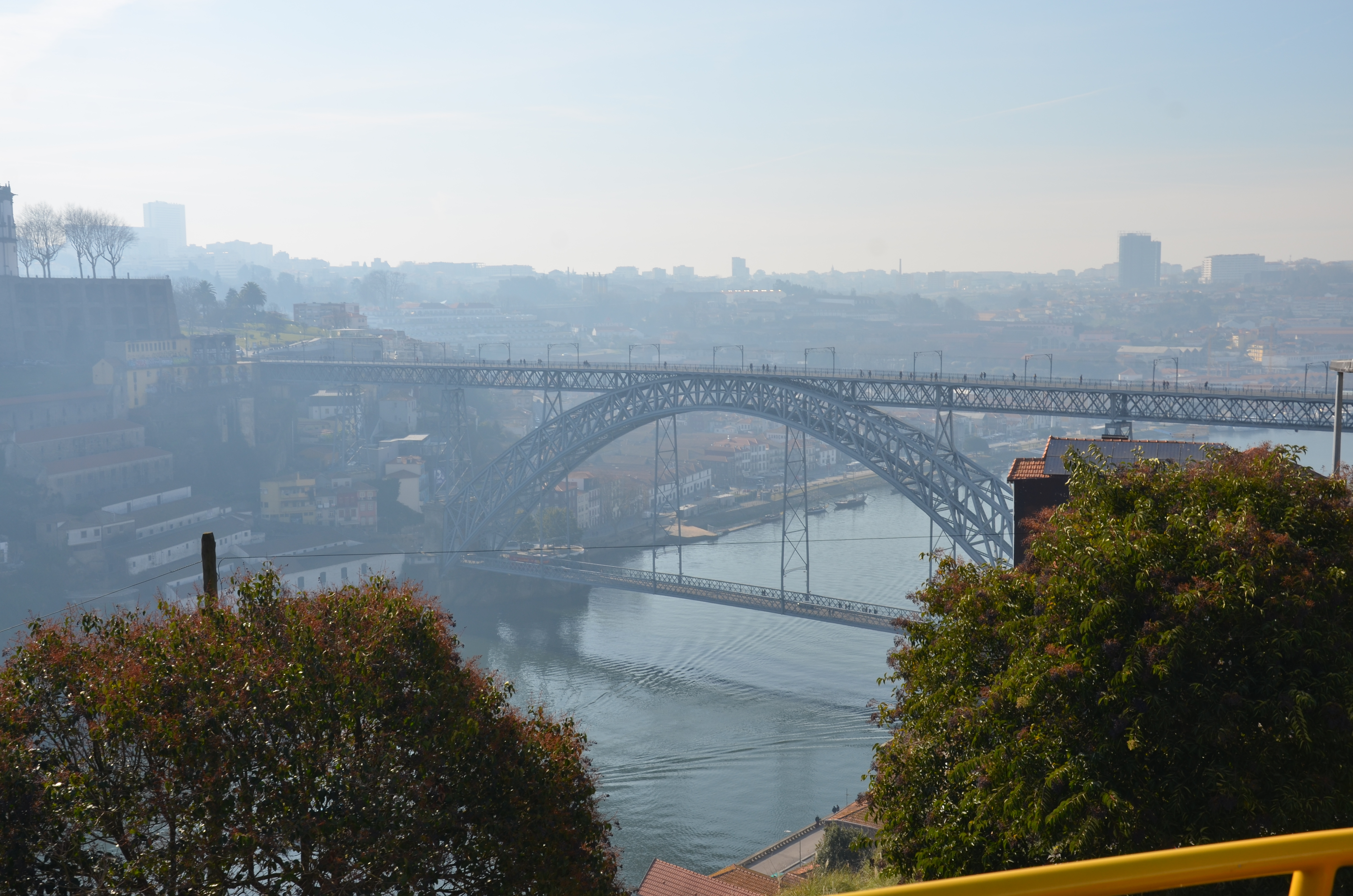 De Dom Luis I-brug in Porto.